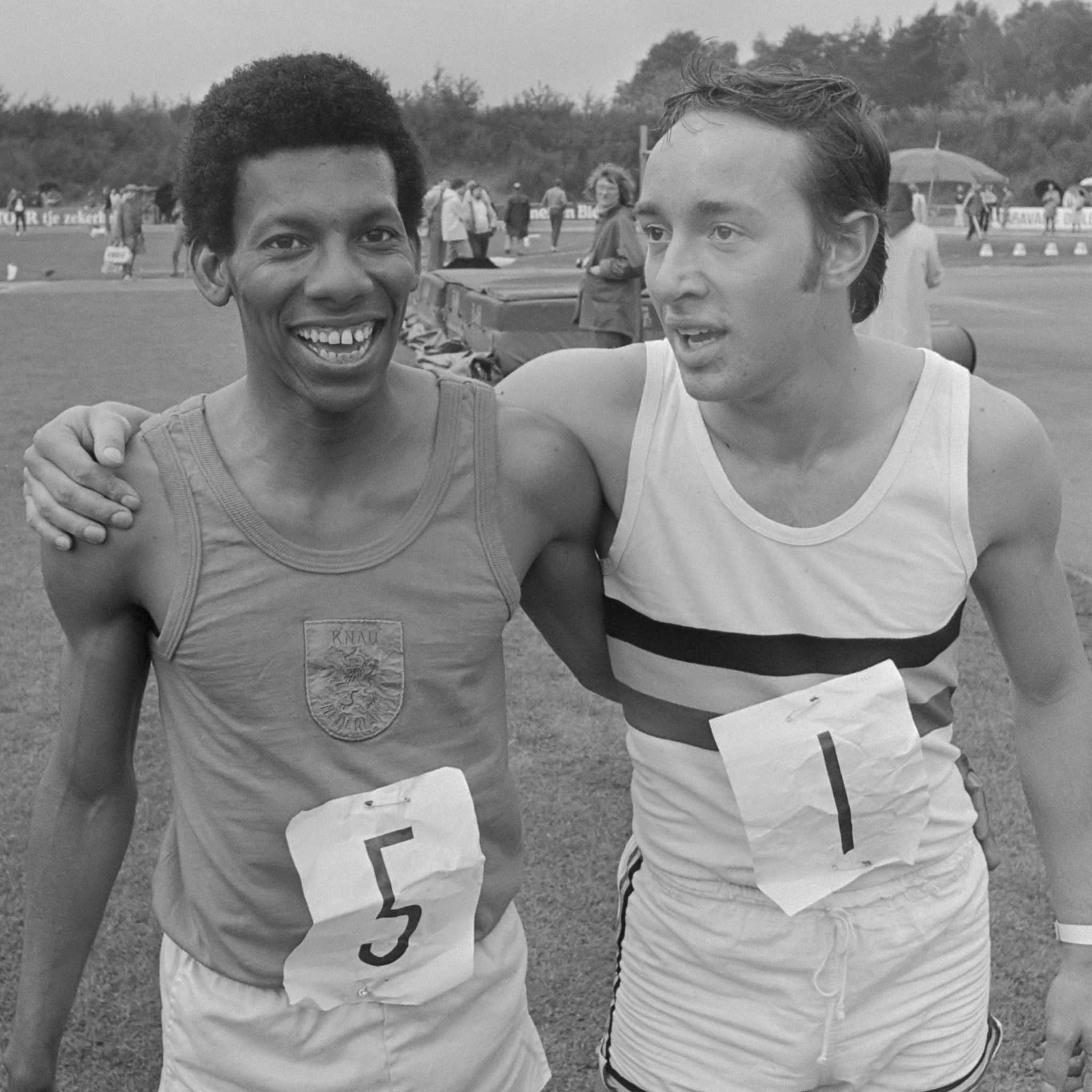 Atletiekinterland Nederland, Duitsland B, België op Papendal; Raymond Heerenveen (links) en Lambert Micha 11 augustus 1974